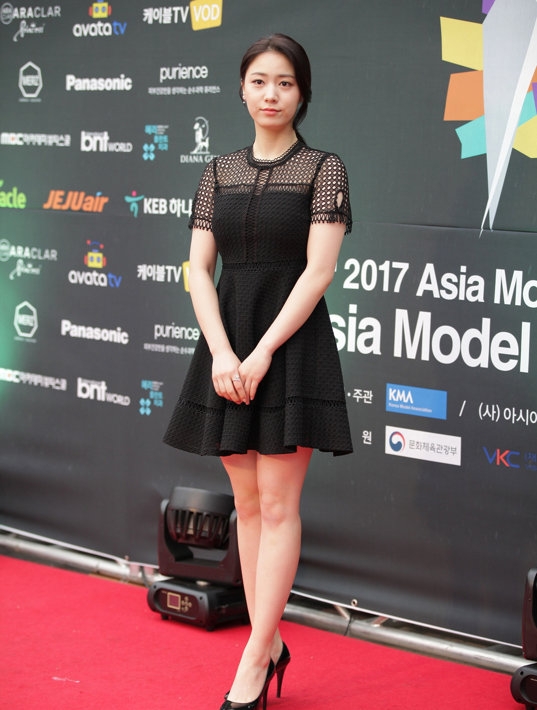 2017 아시아 모델 페스티벌 레드카펫